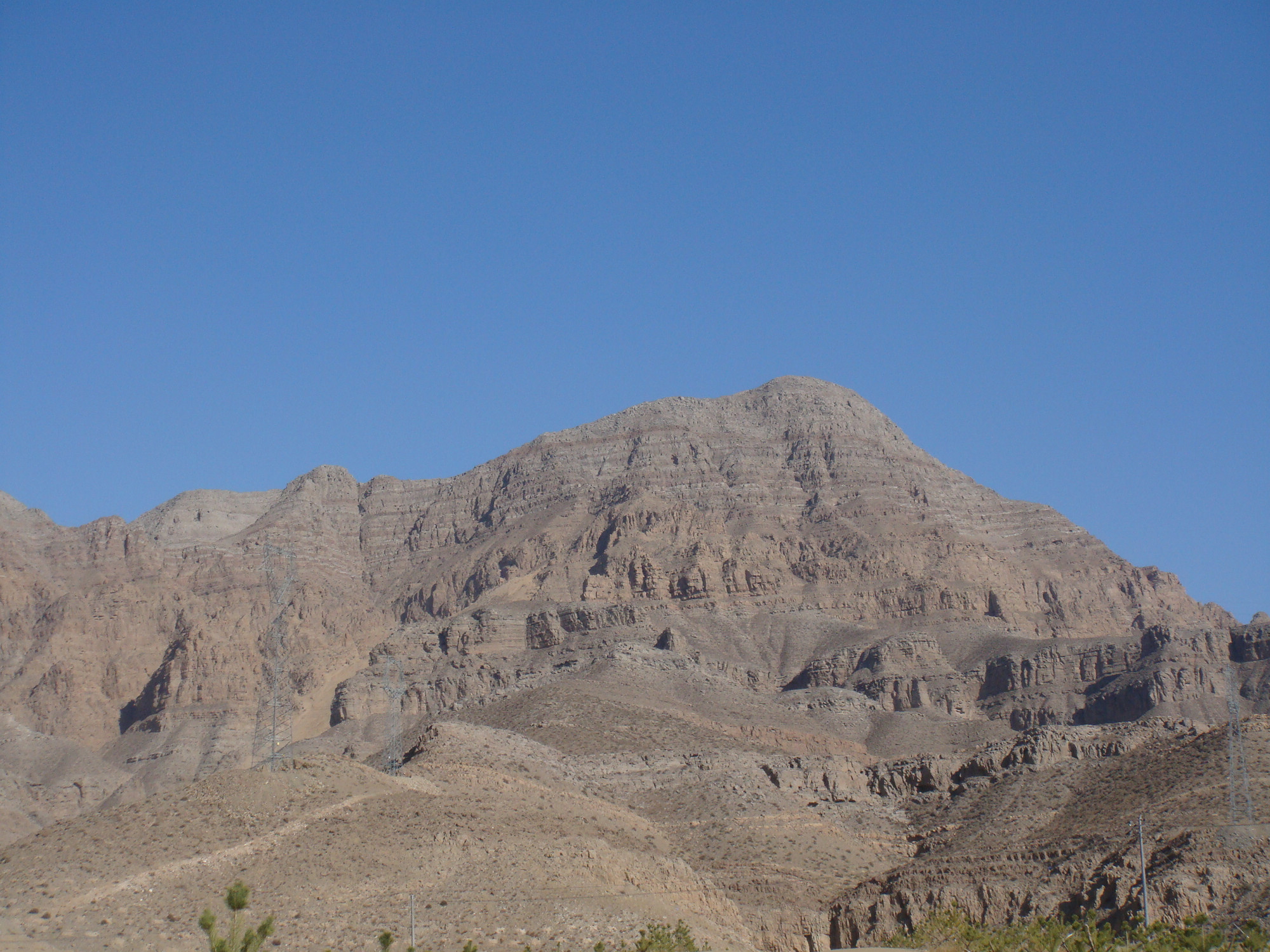 乌海市甘德尔山